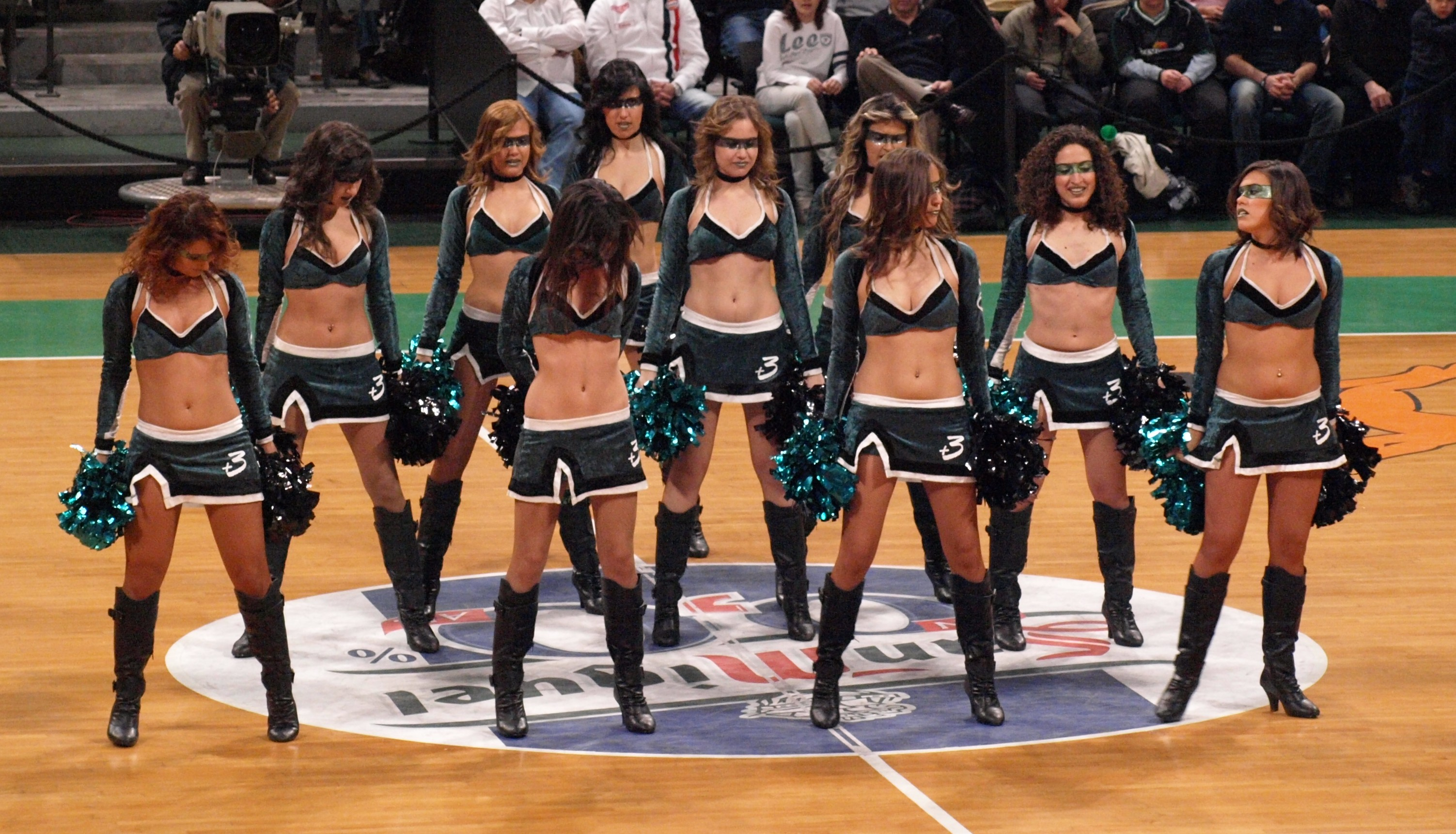 Animadoras del DKV Joventut durante el partido que enfrentó a este equipo con el FCB en enero de 2009